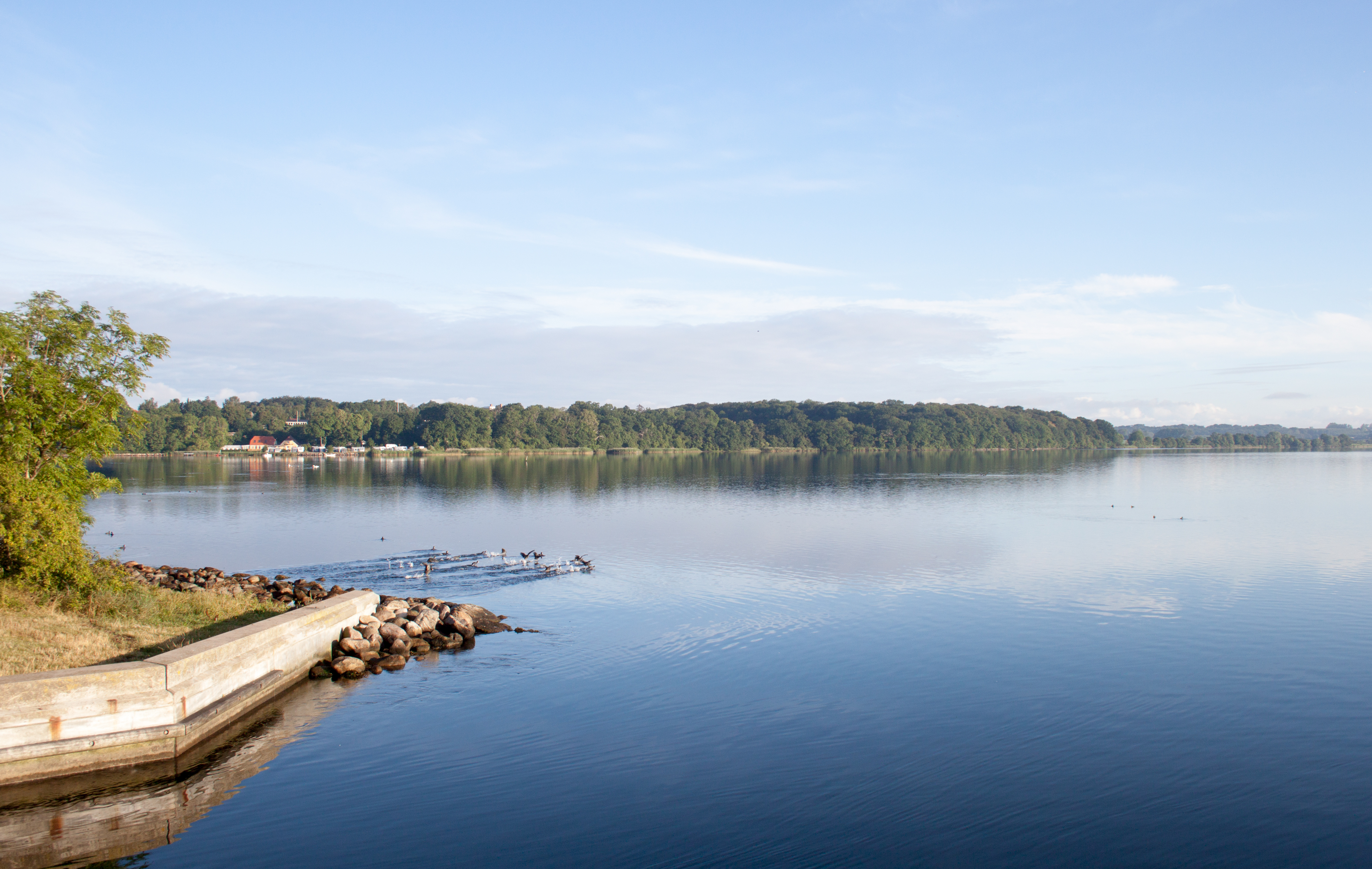 View ofr Noretlabel QS:Len,"View ofr Noret" label QS:Lhu,"A Noret öböl látképe"